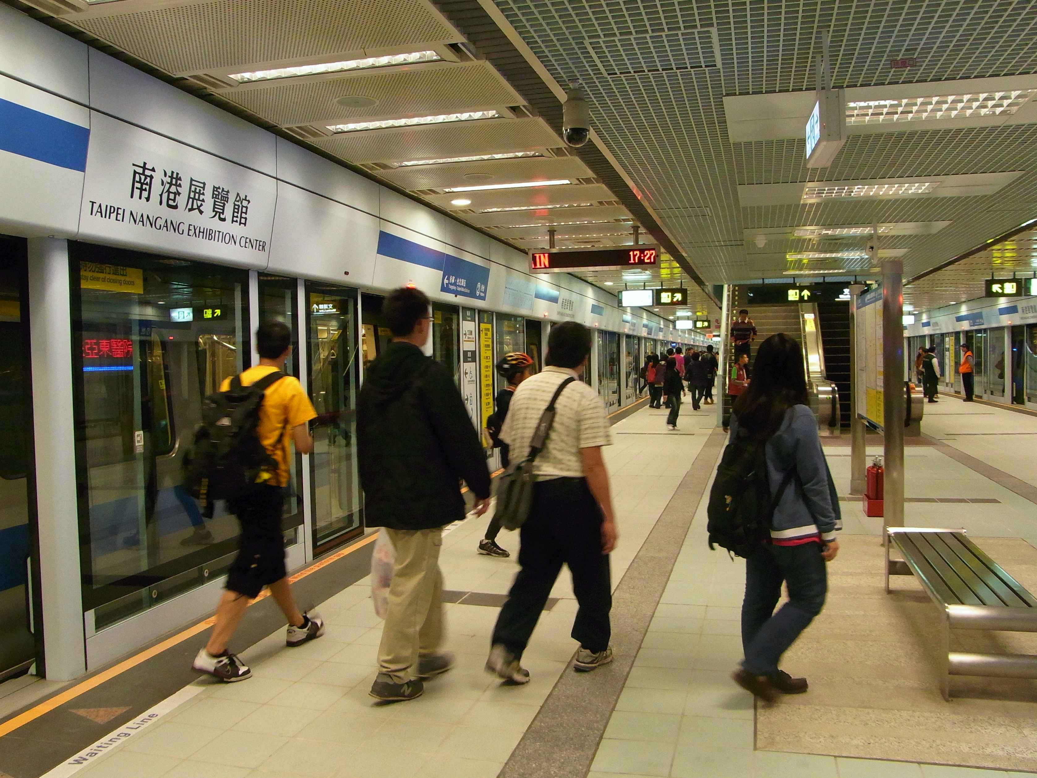 台北捷運南港展覽館站藍線第二月台。